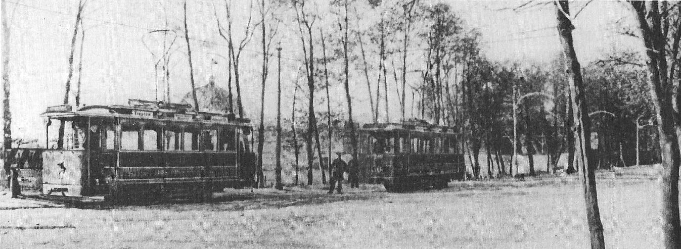 Triebwagen 17 und 30 des Treptower Betriebsteils der Elektrischen Straßenbahnen in Berlin (ab 1899: Berliner Elektrische Straßenbahnen) in der Bulgarischen Straße in Treptow.